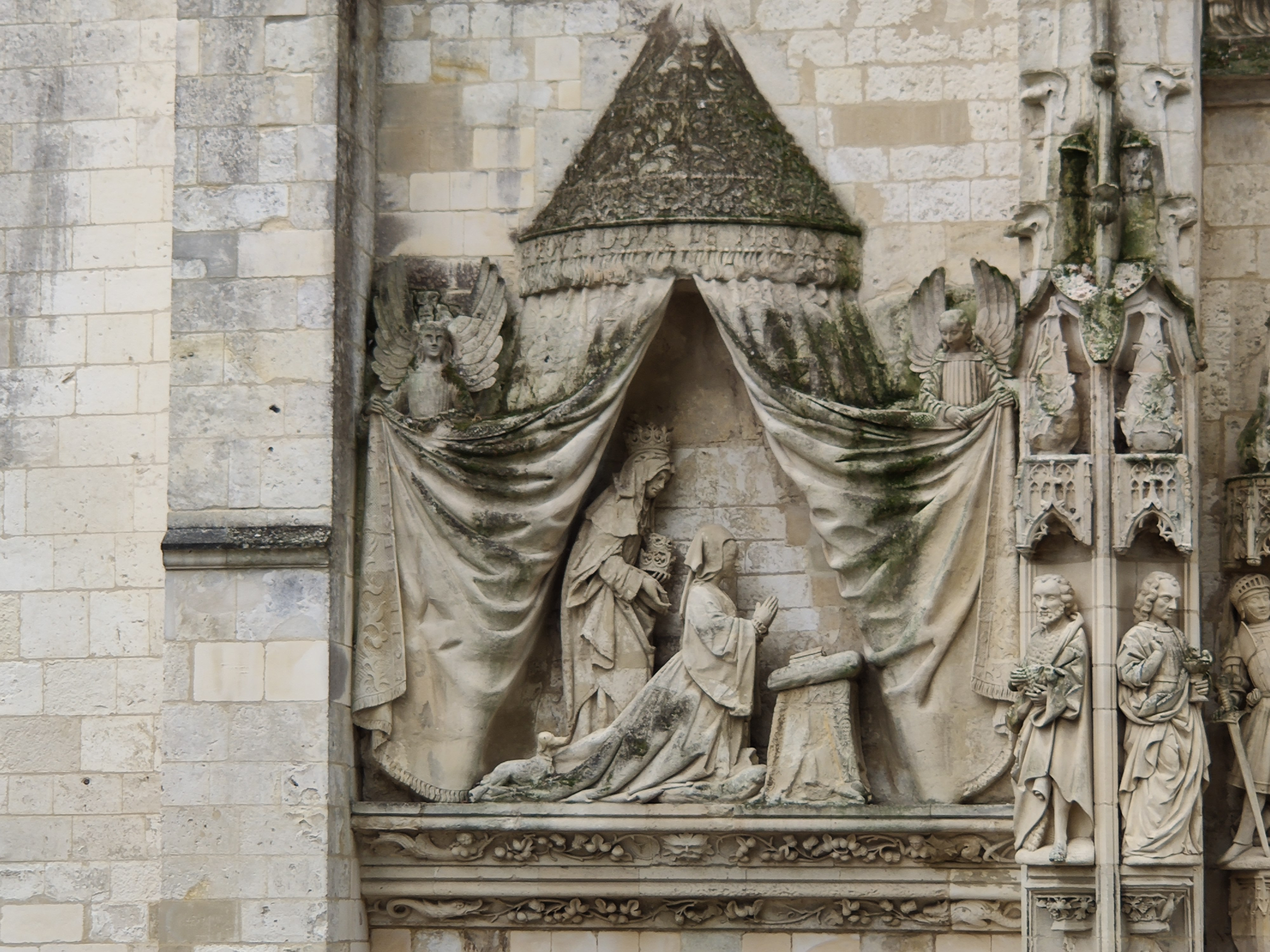 Mailly-Maillet : L'église Saint-Pierre ; Monument funéraire d'd'Isabeau de Tilly, femme de J. de Mailly